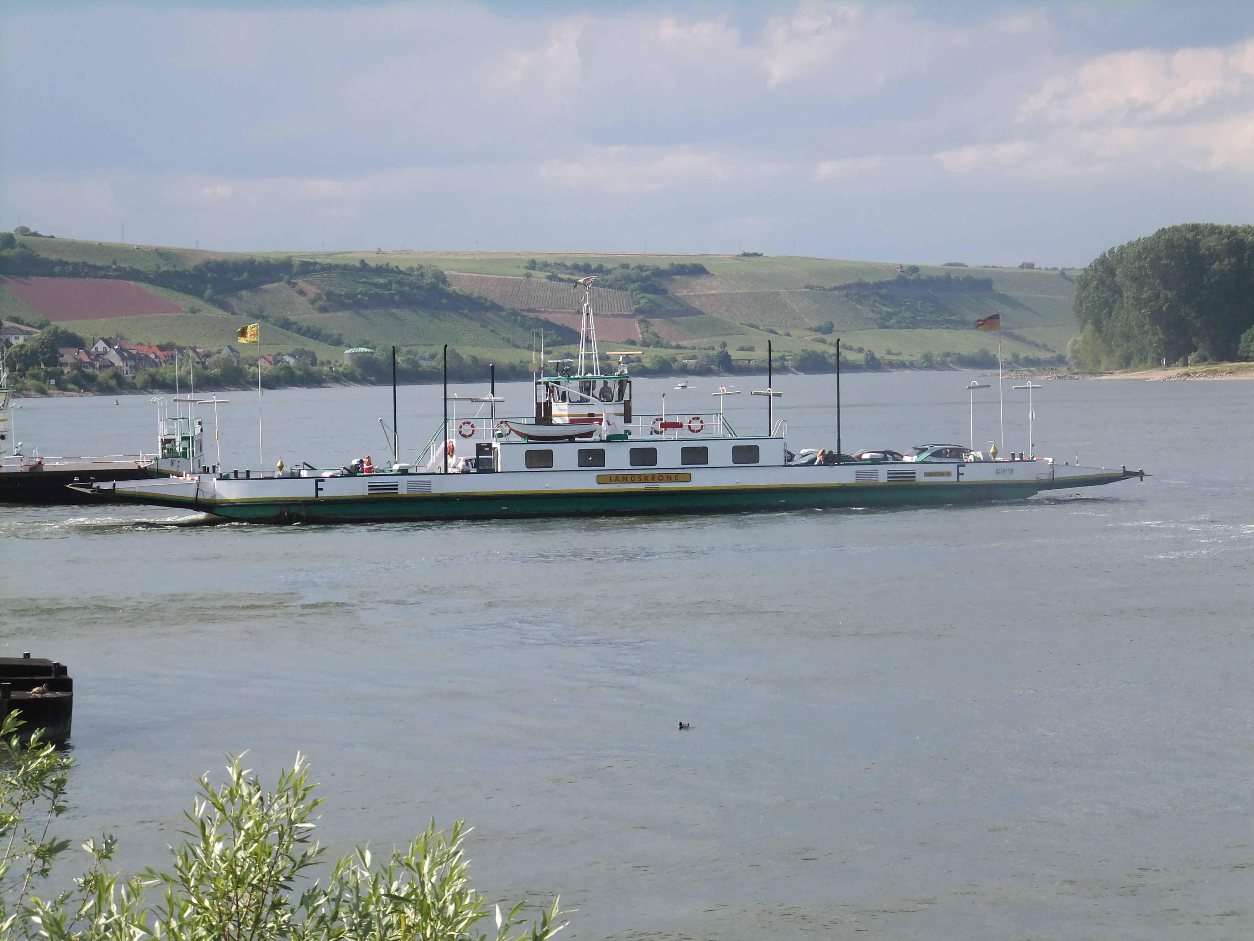 Die Rheinfähre Landskrone auf dem Rhein bei Nierstein in Rheinland-Pfalz (Deutschland) auf dem Weg nach Kornsand in Hessen